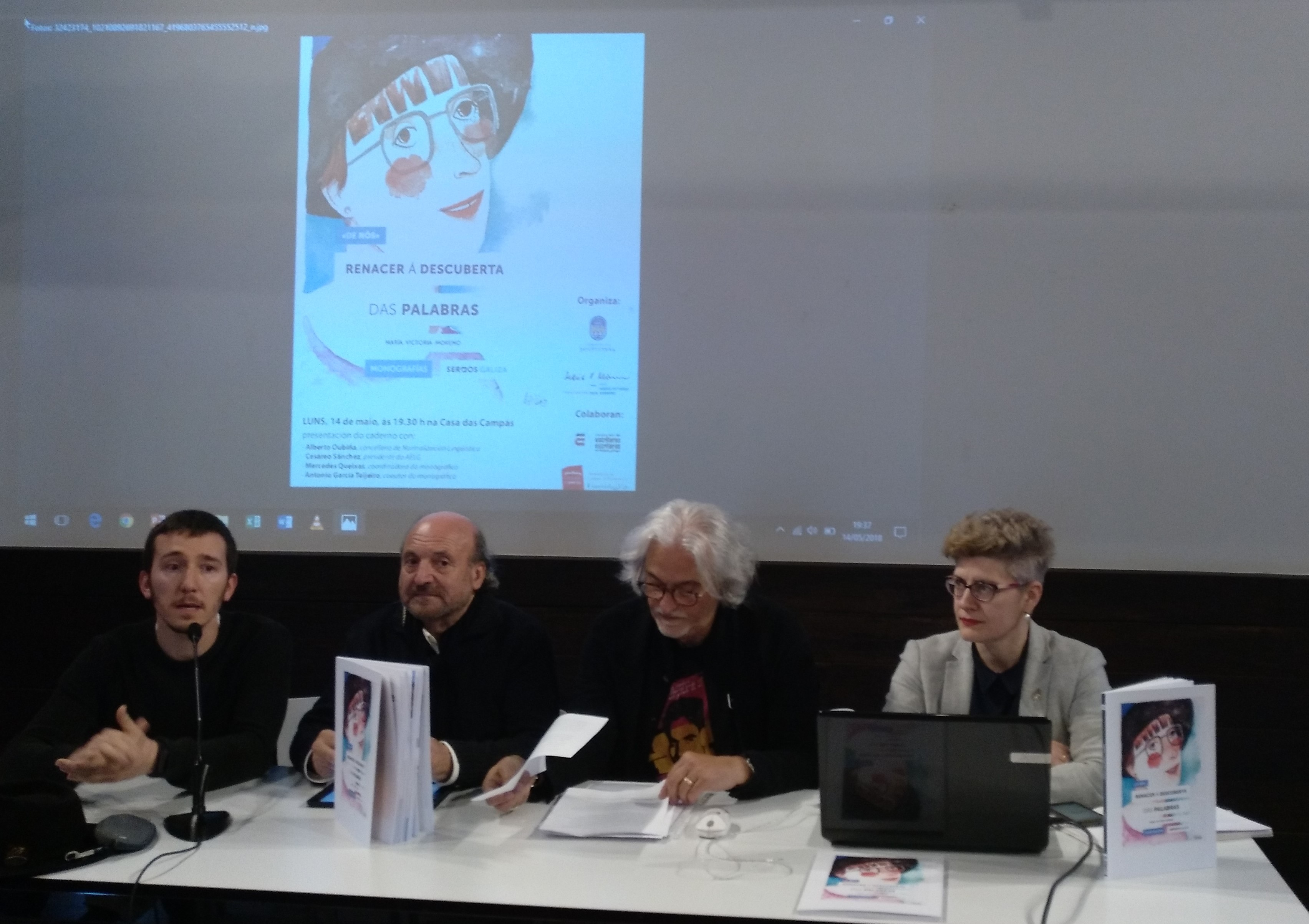 Presentación de "Renacer á descuberta das palabras", monográfico de "Sermos Galiza" sobre María Victoria Moreno. Con Alberte Oubiña, Cesáreo Sánchez Iglesias, Antonio García Teijeiro, Mercedes Queixas. Pontevedra, 14/05/2018. Casa das Campás.